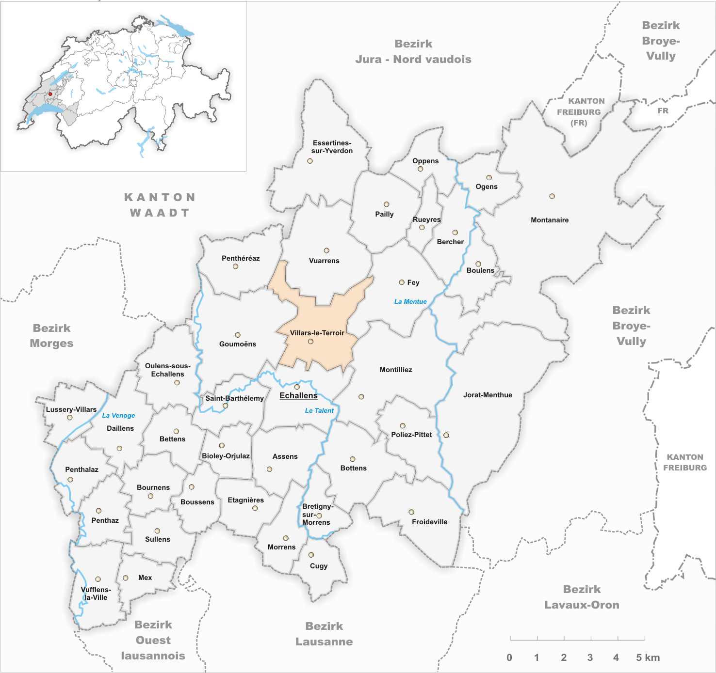 Municipality Villars-le-Terroir